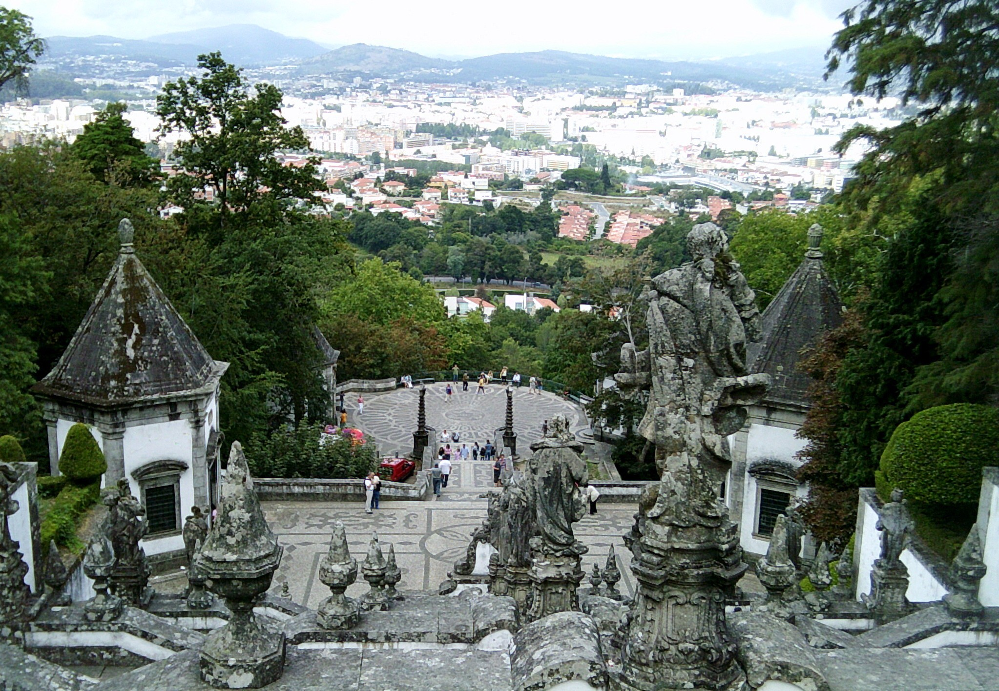 Santuário do Bom Jesus do Monte, freguesia de Tenões, concelho e distrito de Braga, Portugal: aspecto da escadaria.